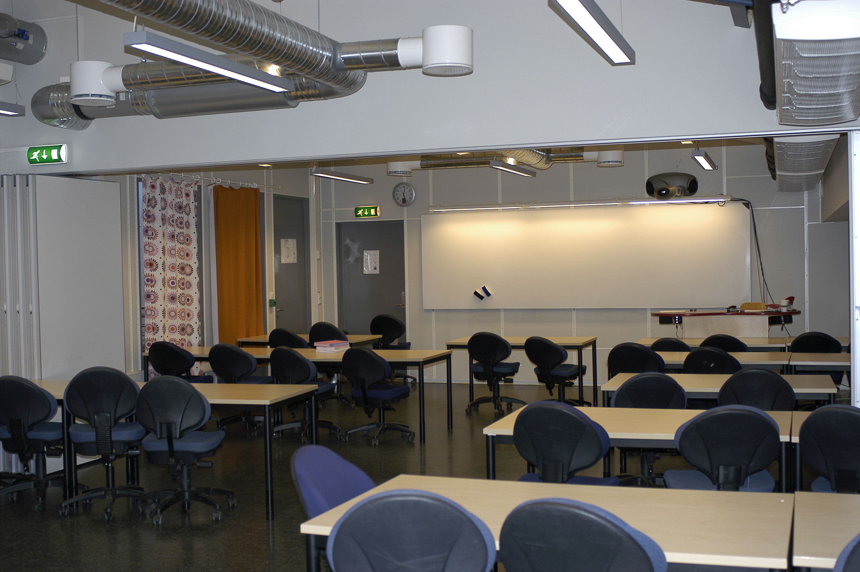 Et av klasserommene på Akademiet.